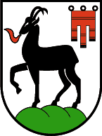 Götzis, Vorarlberg: Ein silberner Schild, aus dessen Fuß sich ein grüner Dreiberg erhebt, auf dessen Spitzen eine schwarze, rotbezungte Gemse (Rupicapra rupicapra) mit erhobenem rechtem Vorderfuß steht. Im linken Obereck des Schildes ist das rote montfortische Banner zu sehen. Den Schild umgibt eine ornamentierte bronzefarbige Randeinfassung. (Verleihung: 20. Oktober 1928)